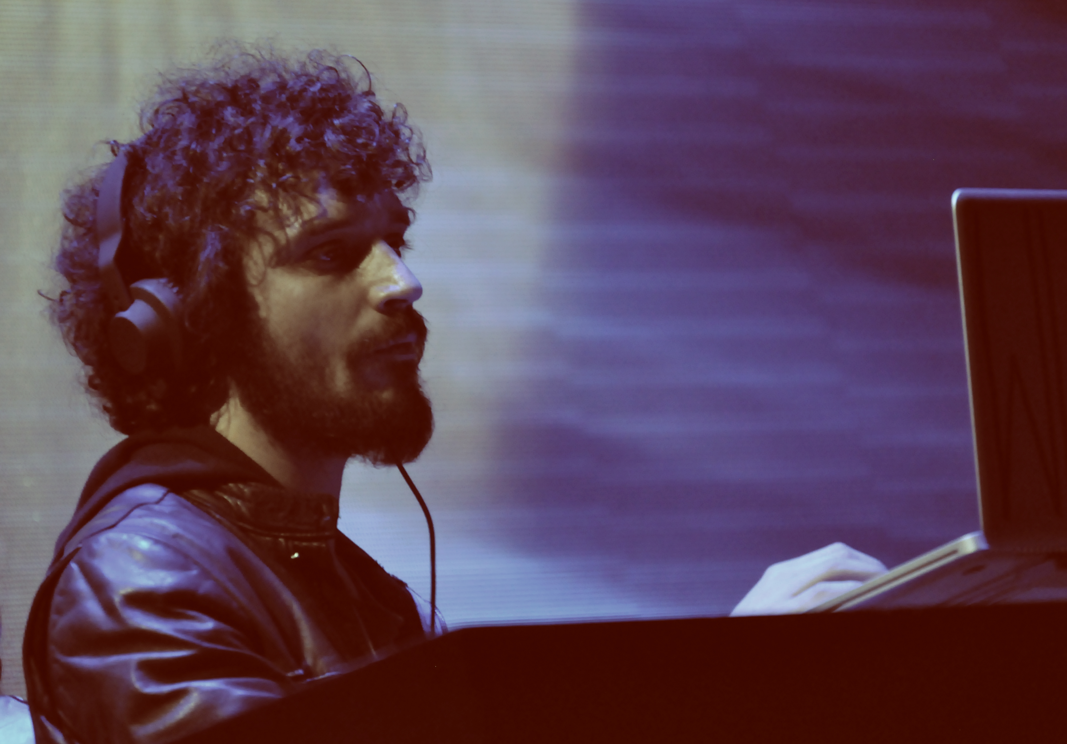 Fabrizi Moretti from The Strokes